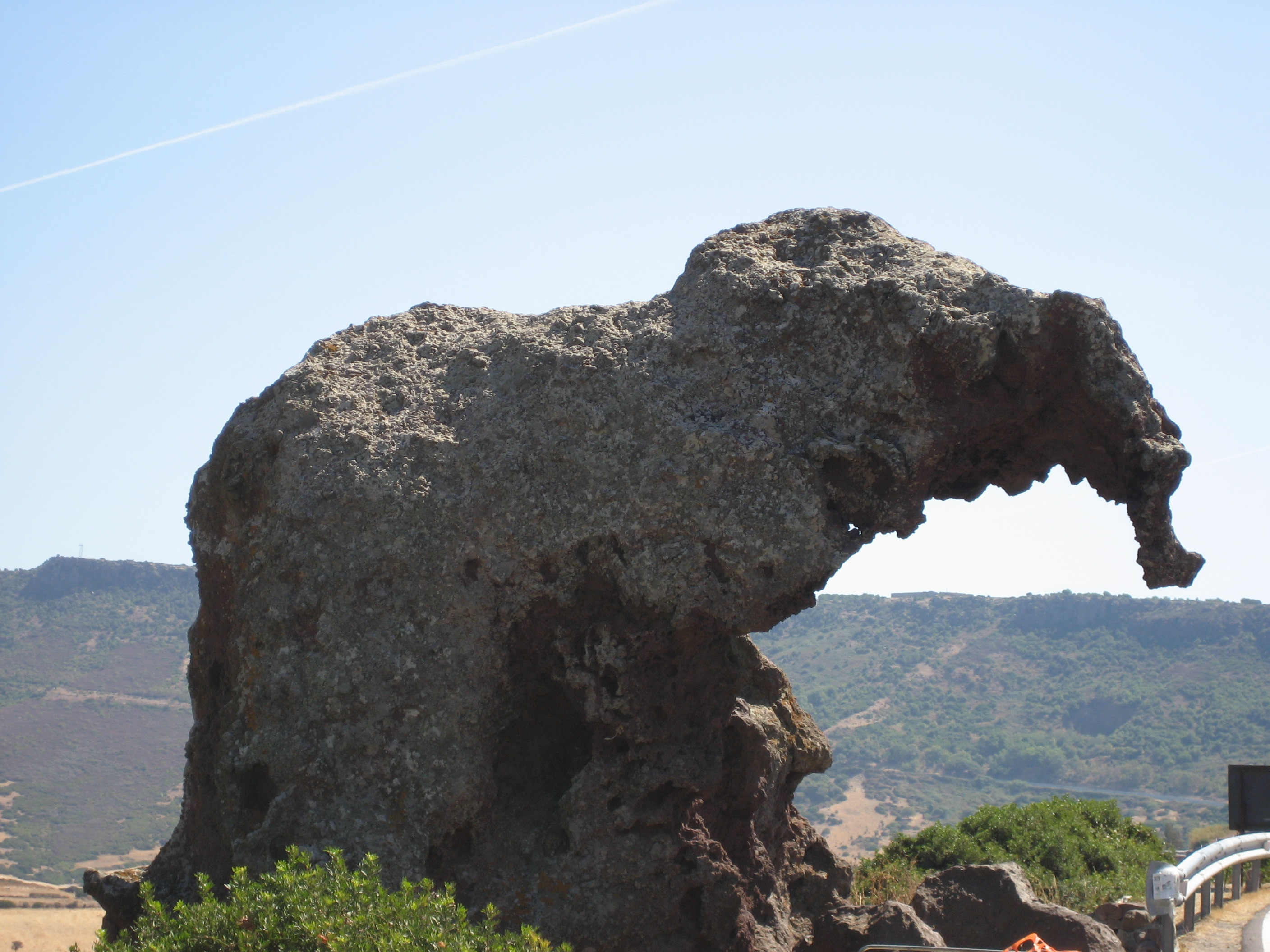 Roccia dell'elefante, Castelsardo, Sardegna